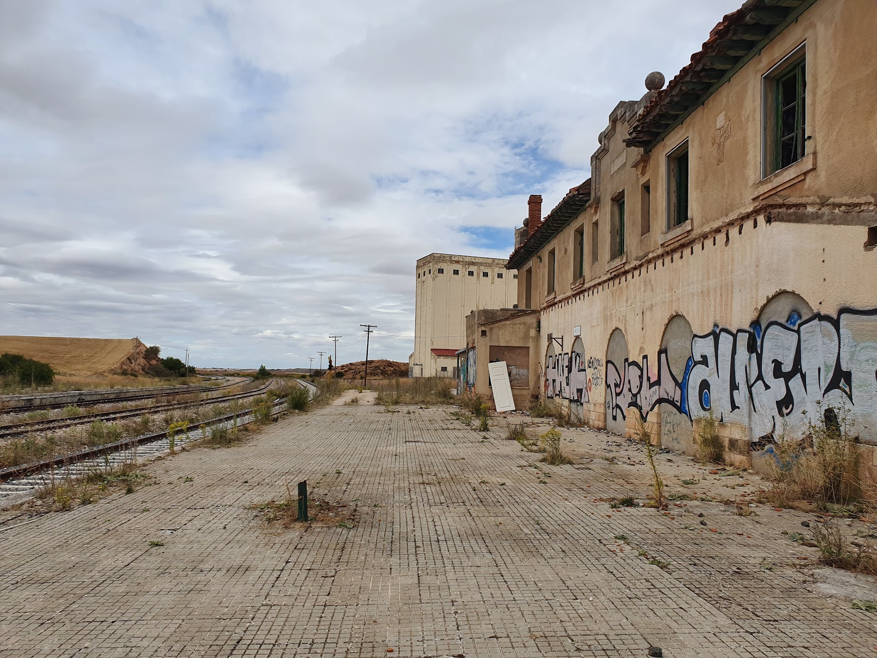 Podemos observar el estado de la instalación